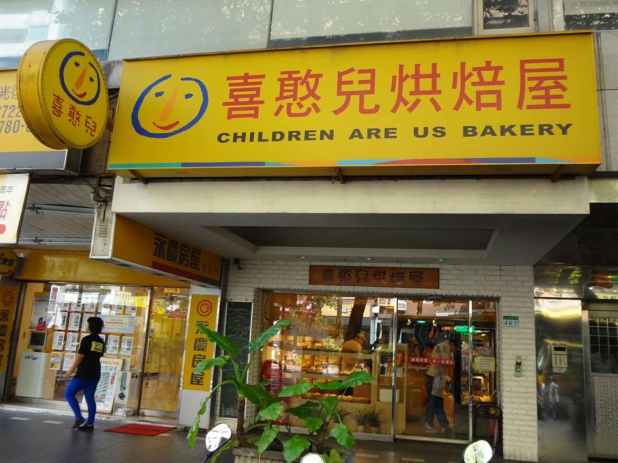 喜憨兒基金會喜憨兒烘焙屋光復店，位於臺北市信義區光復南路461號1樓。